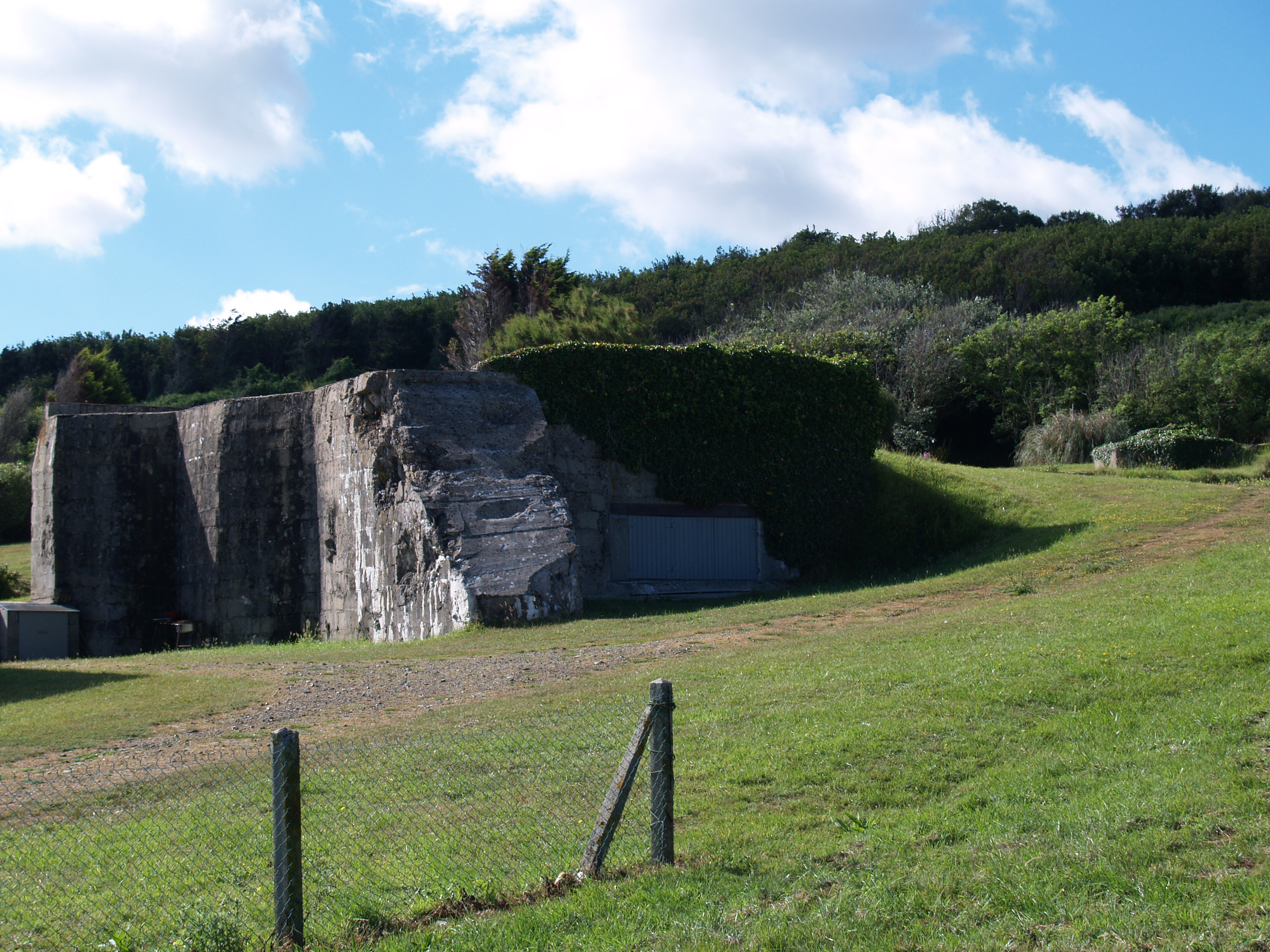 Bunker van Widerstandsnest 61